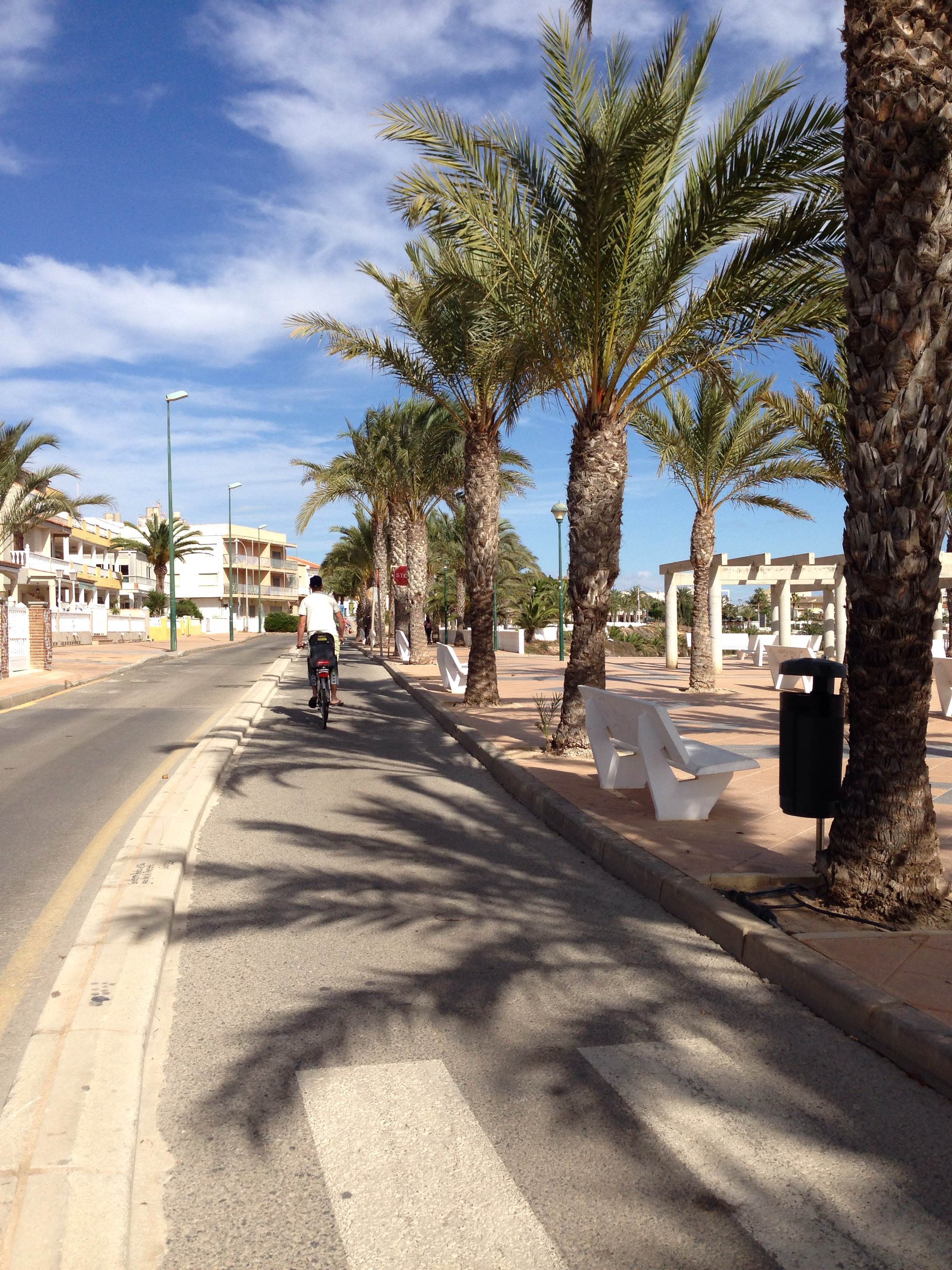 Carril bici Pilar de la Horadada - Paseo marítimo